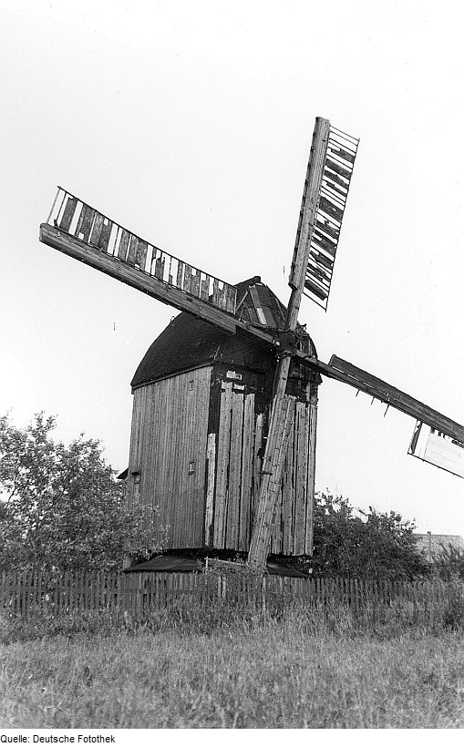 Original image description from the Deutsche Fotothek Huy-Dingelstedt am Huy. Bockmühle, um 1897 erbaut